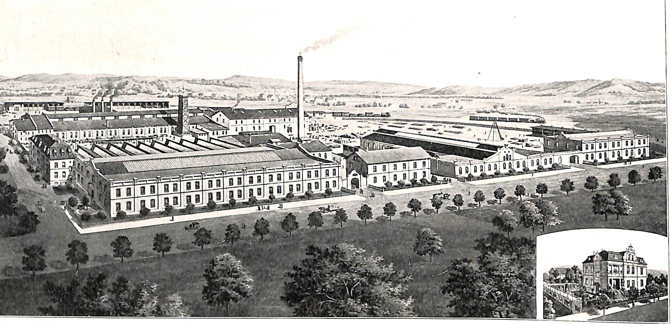 Giessen - (fiktive) Ansicht der Werkzeugmaschinenfabrik Heyligenstaedt & Co AG.